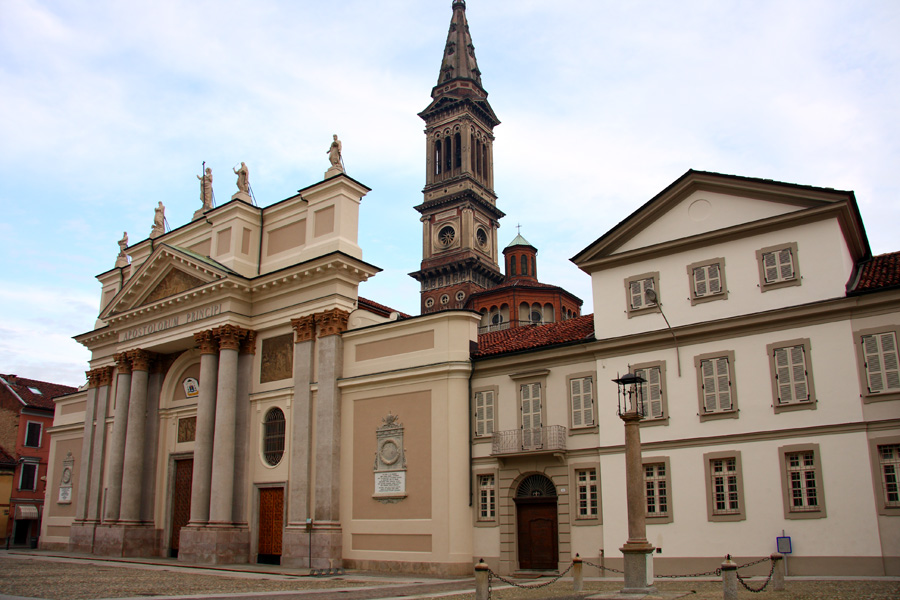 Alessandria, Scorcio di Piazza del Duomo